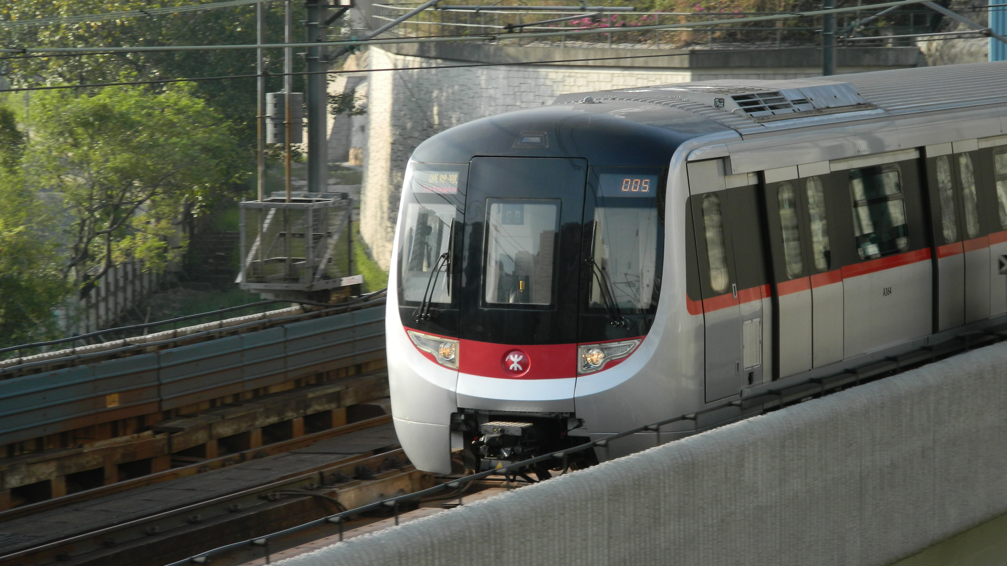 第8編組列車於九龍灣